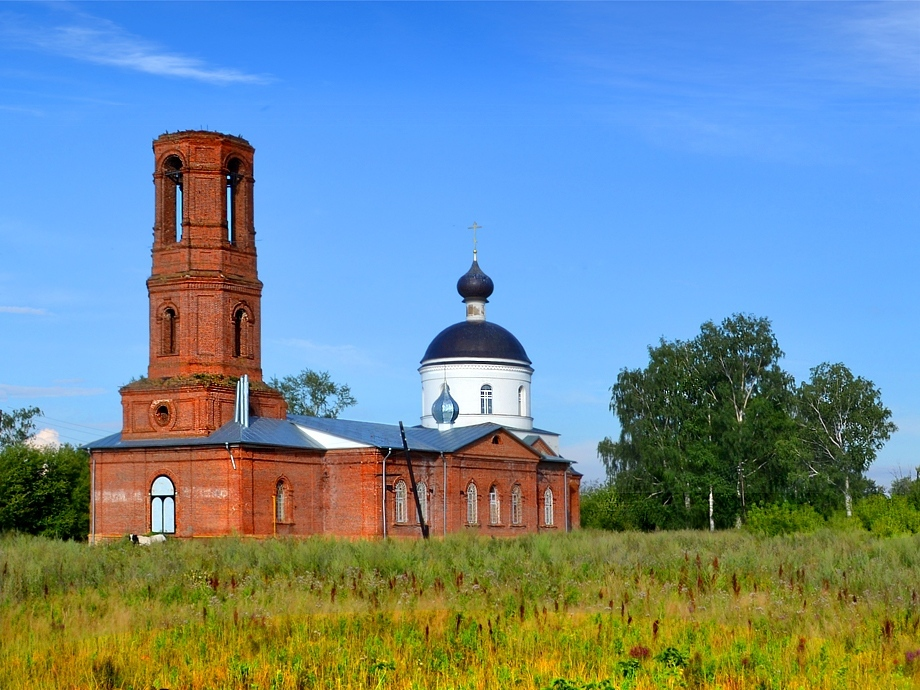 Храм Покрова Бурминка